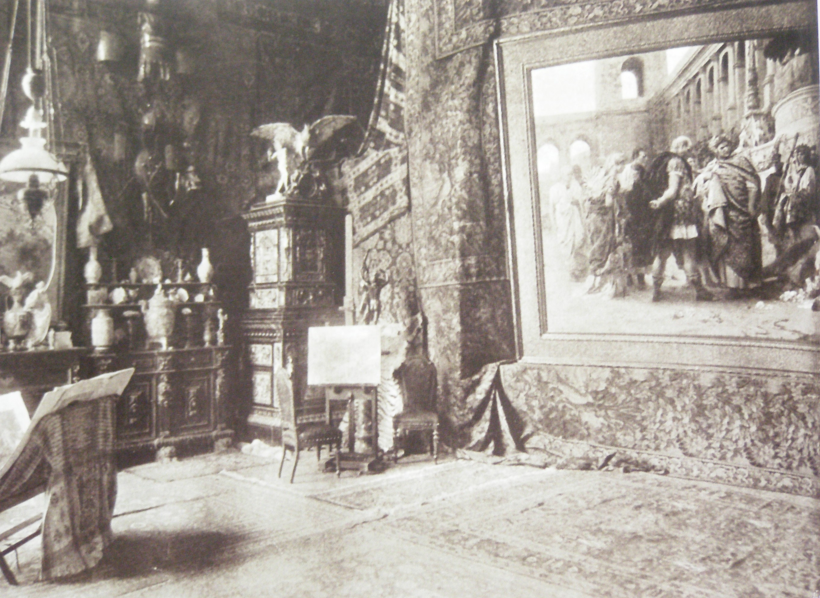 Интерьер мастерской Семирадского в Риме, в доме на виа Гаета, 1. Около 1896 года